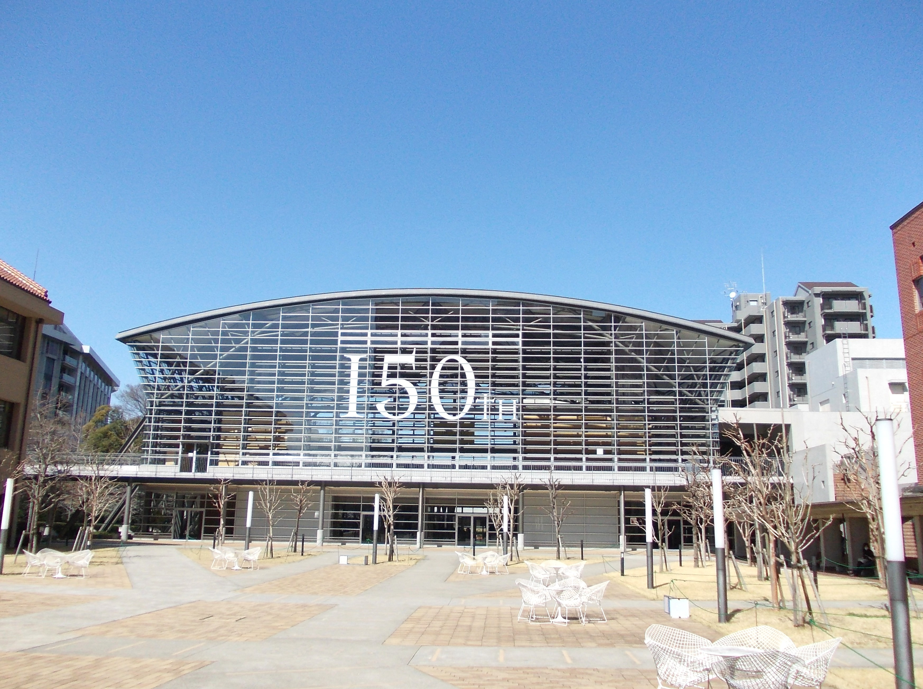 Basa Jawa: 明治学院大学